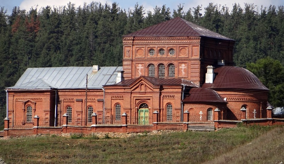 Свято-Никольский храм. с. Кага